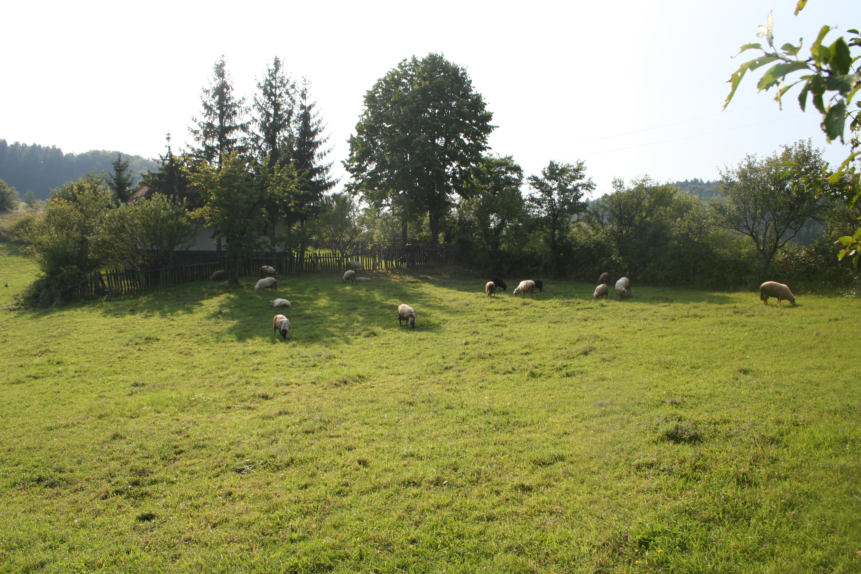 Vlaške njive, Sakar